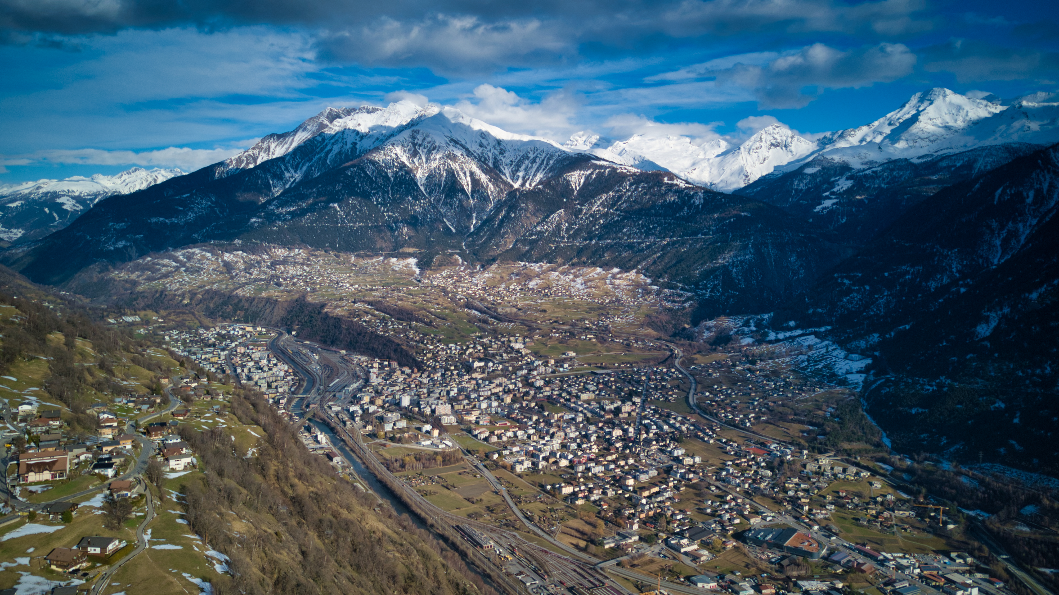 Brig von Mund aus gesehen im März 2020